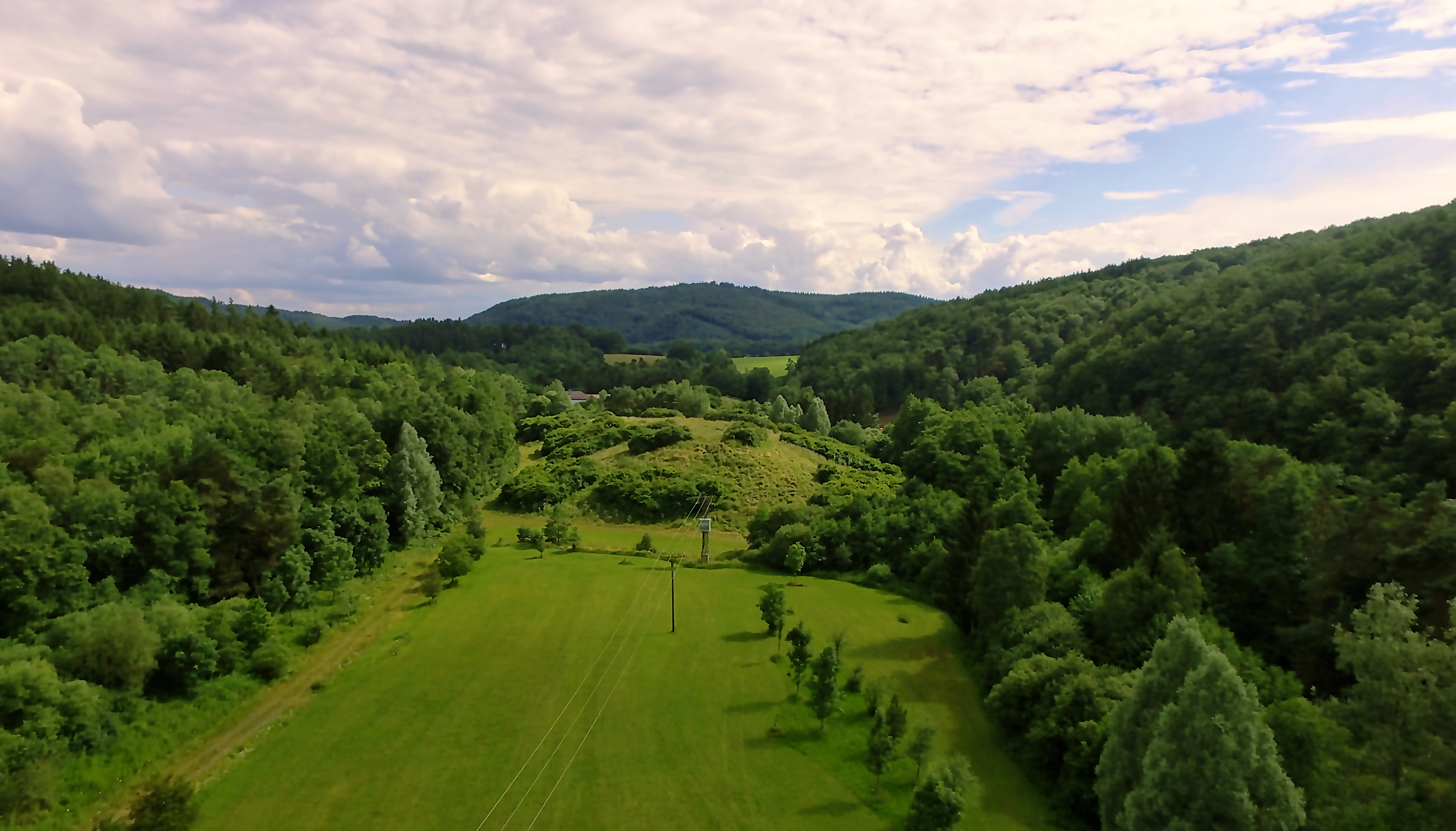 Renaturierter ehemaliger Standort der ehamaligen Urananlage Ellweiler mit Abraumhalde im Hintergrund